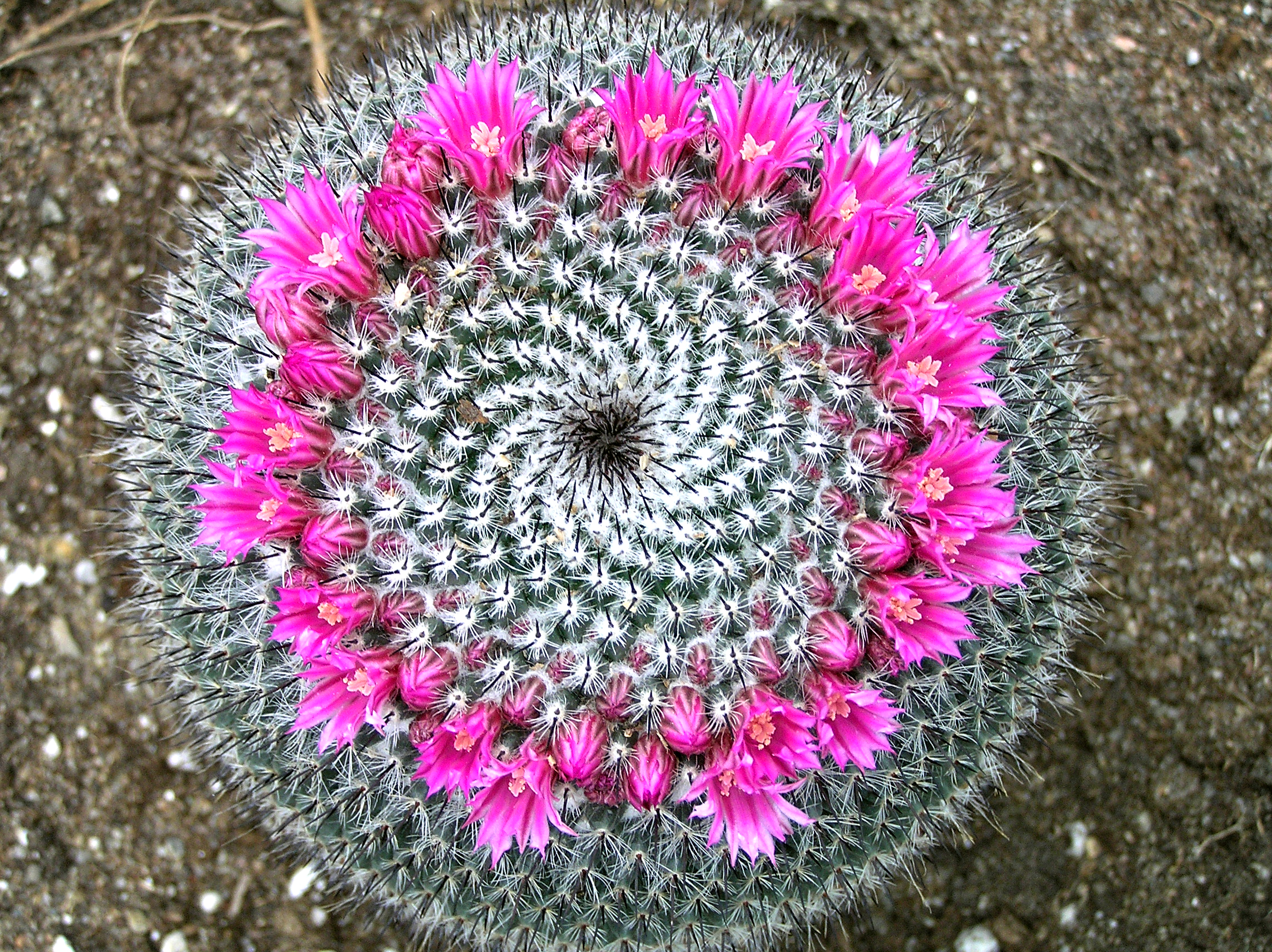 Montréal (Québec) - Mammillaire Pincushion cactus (Mammillaria supertexta cactaceae) au jardin botanique